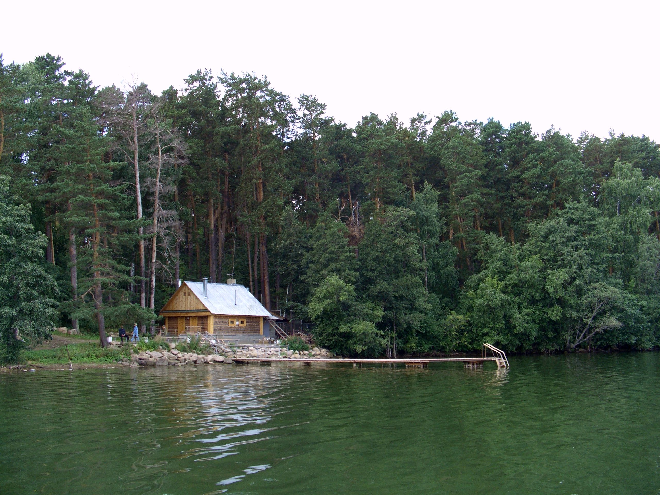 озеро Кисегач